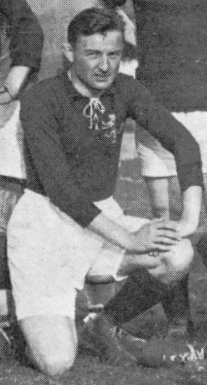 El futbolista Pedro Vallana (1897-1980), durante su participación en los Juegos Olímpicos de Amberes 1920 con la selección de España.